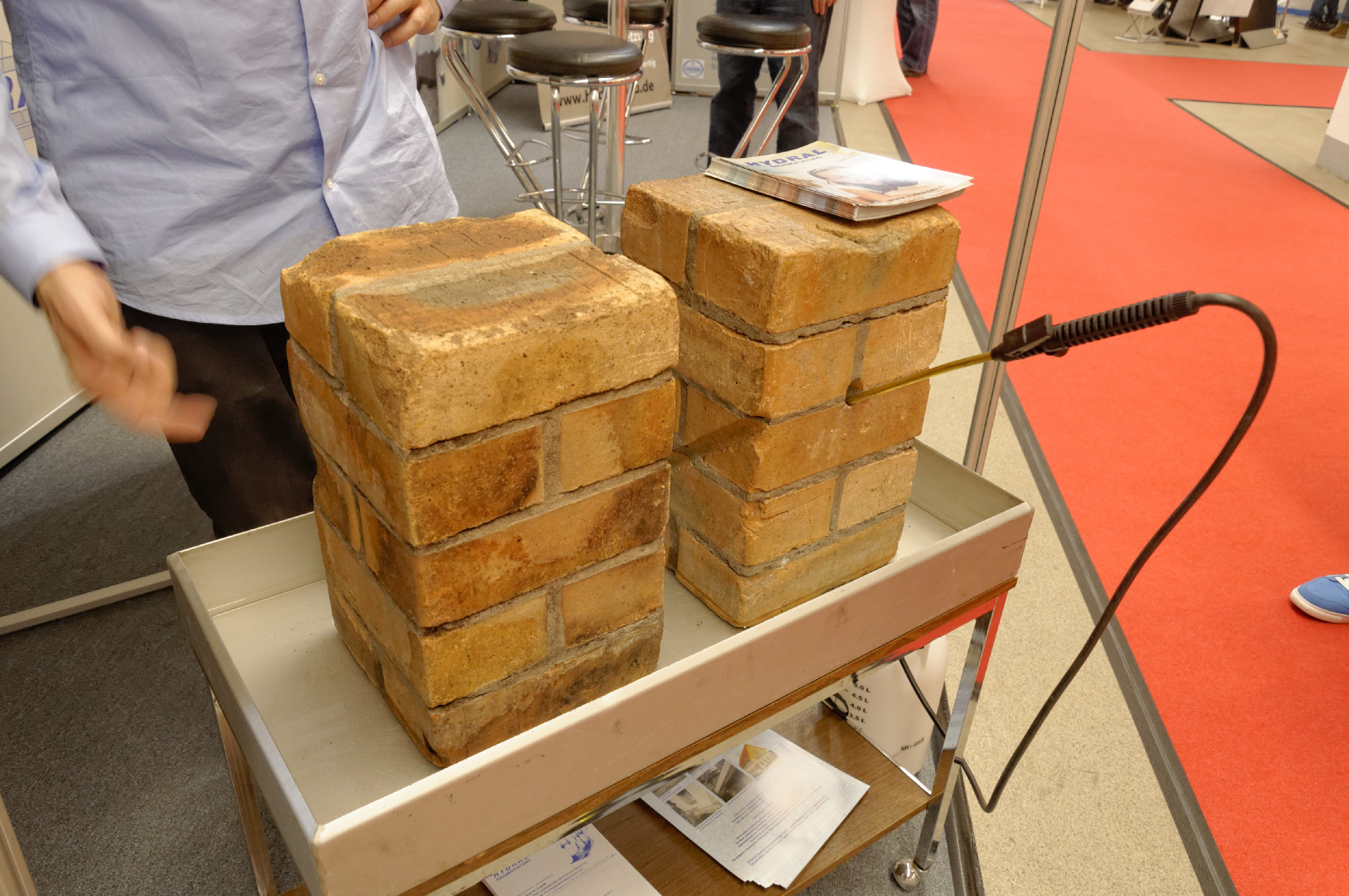 Vergleich mit und ohne Sperre auf der Sindelfingen Haus & Energie 2018 Messe